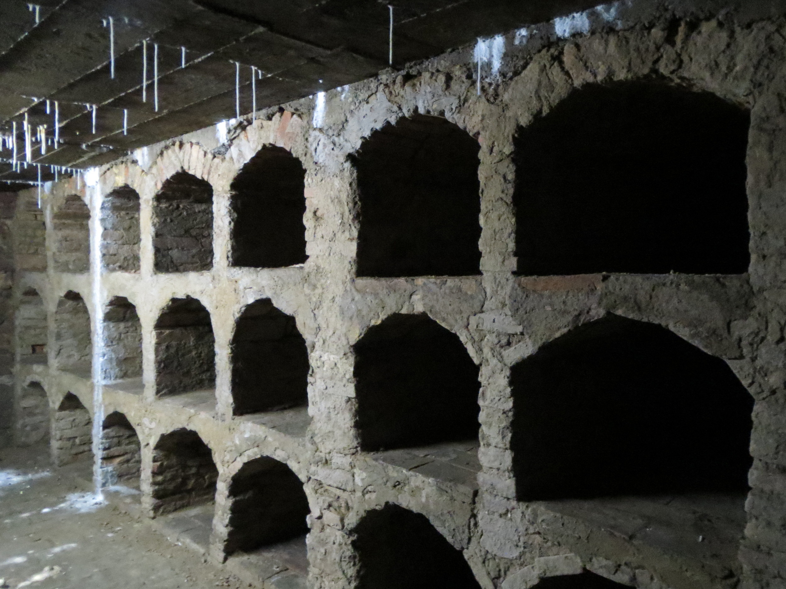 Jesuitengruft (Speyer)